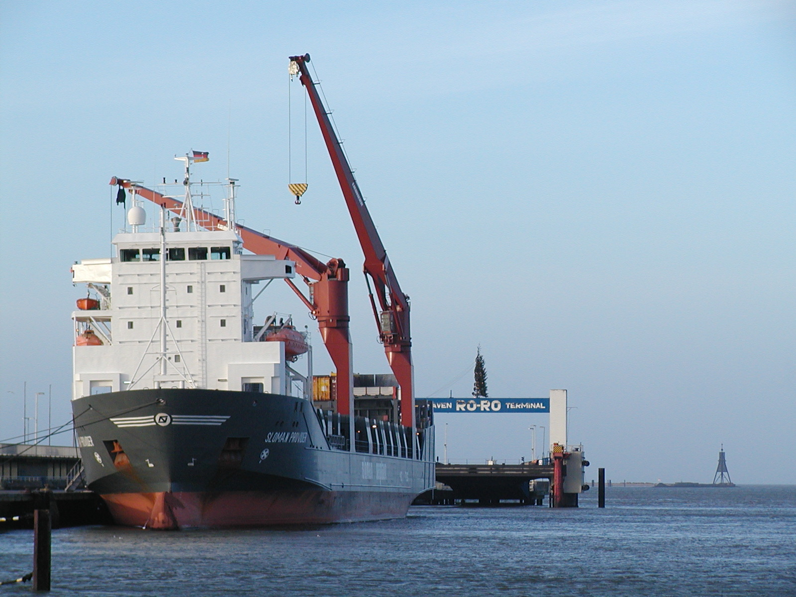 Weihnachten, ein Schiff und die Kugelbake